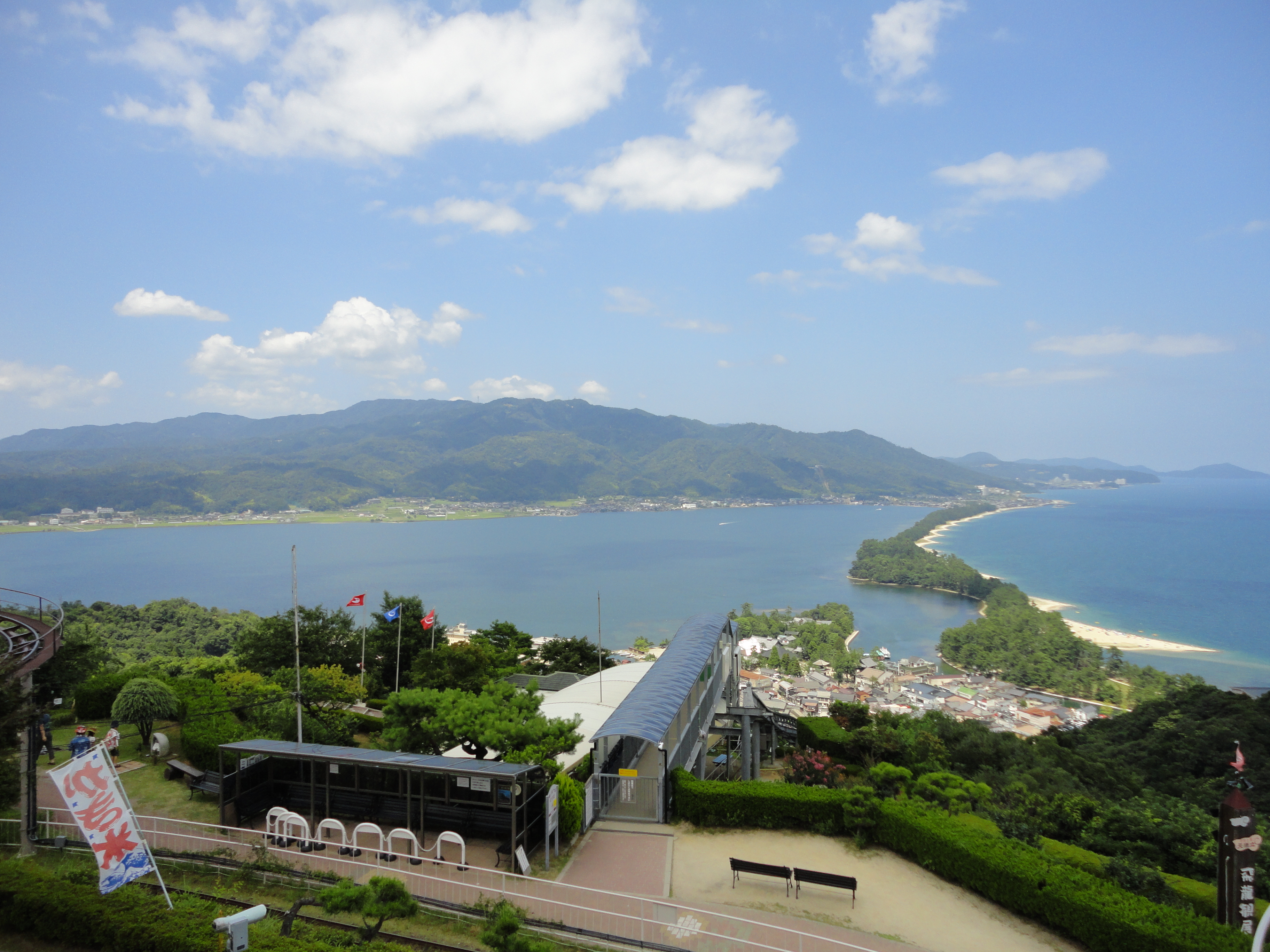 天橋立ビューランド